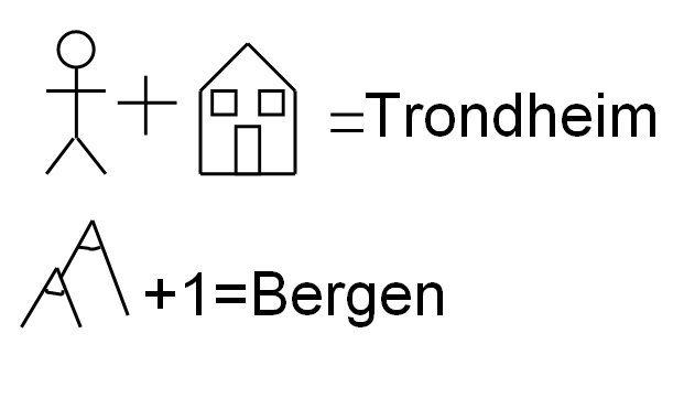 Rebus for Trondheim og Bergen